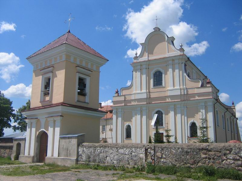 Беларуская (тарашкевіца): Гальшаны